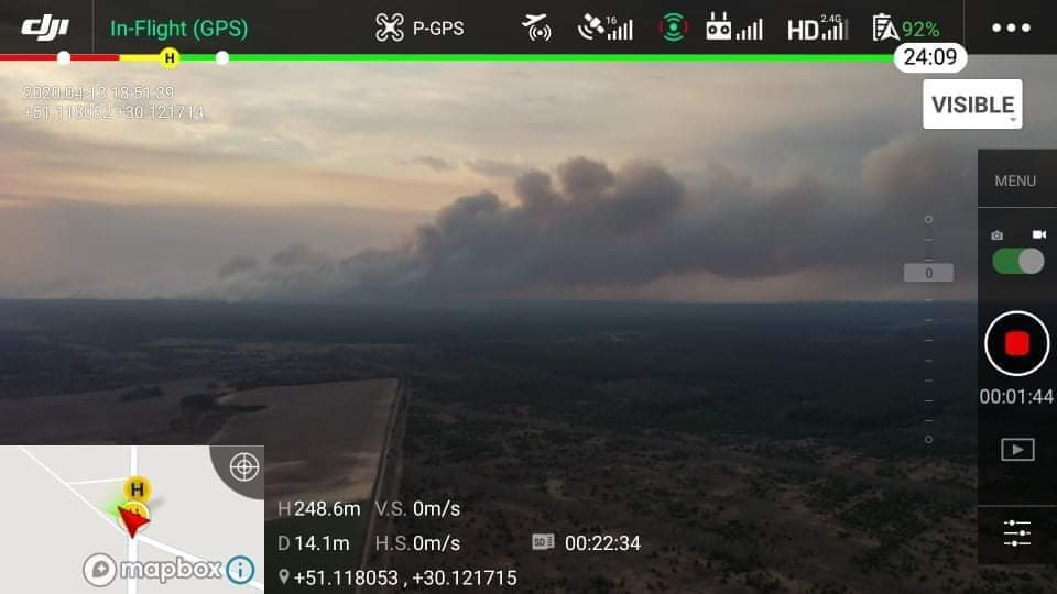 У зоні відчуження спостерігаються верхові пожежі Дата публікації 13 квітня 2020.Опубліковано у НОВИНИ О 18.45 надійшла інформація, що в с. Розсоха триває верхова пожежа, що прийшла з с. Старі Соколи. Також, верхова пожежа спостерігається у р-н. с. Крива гора, що на Лівому березі Прип'яті. Пожежу, яка була між ставом - охолоджувачем та річкою Прип'ять погасили. Також, погасили вогонь, який дійшов до відкритого розпридільчого пристрою. Поліція затрамала чоловіка, який може мати відношення до підпалу у р-н. с. Старі Соколи.